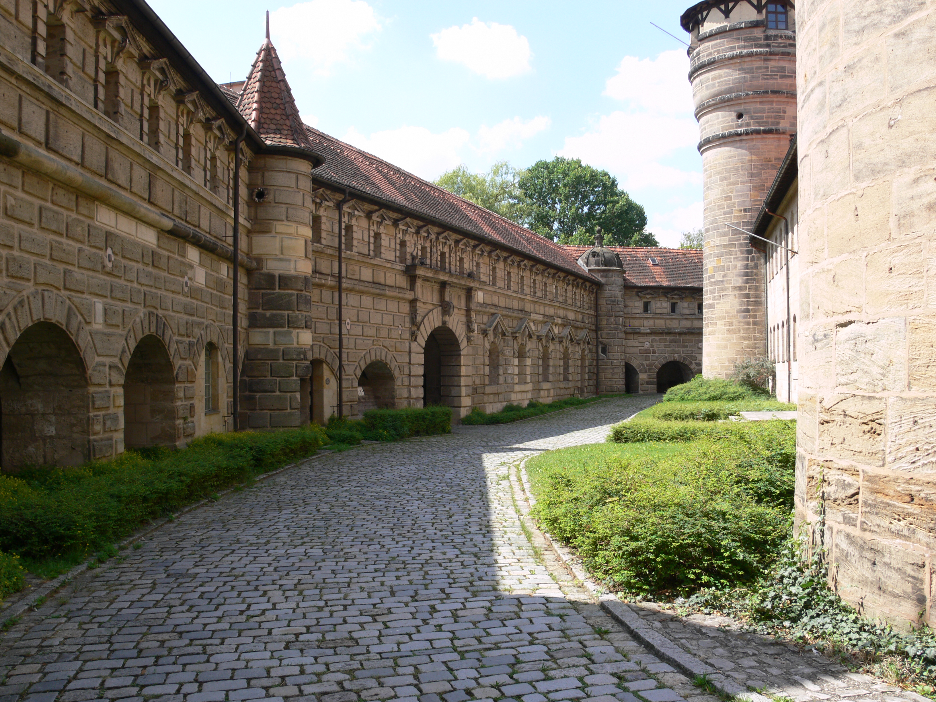 Festung Lichtenau, Lichtenau (Mittelfranken), Landkreis Ansbach Hof